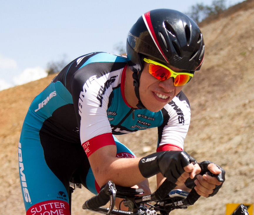 CRI Hombres Sub-23 Campeonatos Nacionales de Ruta Boyacá 2016